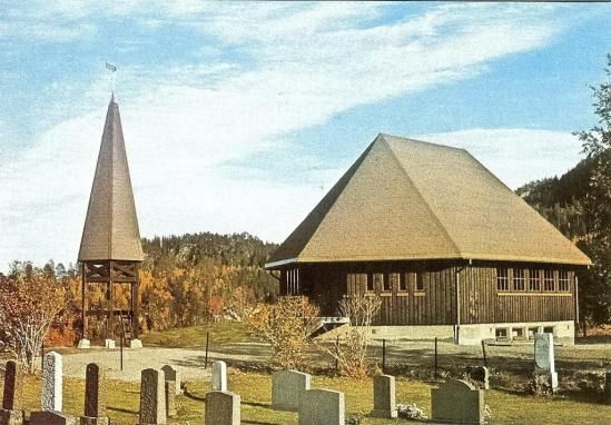 Drageid kapell. Foto: Kai Fredrik Godejord/Riksantikvaren.